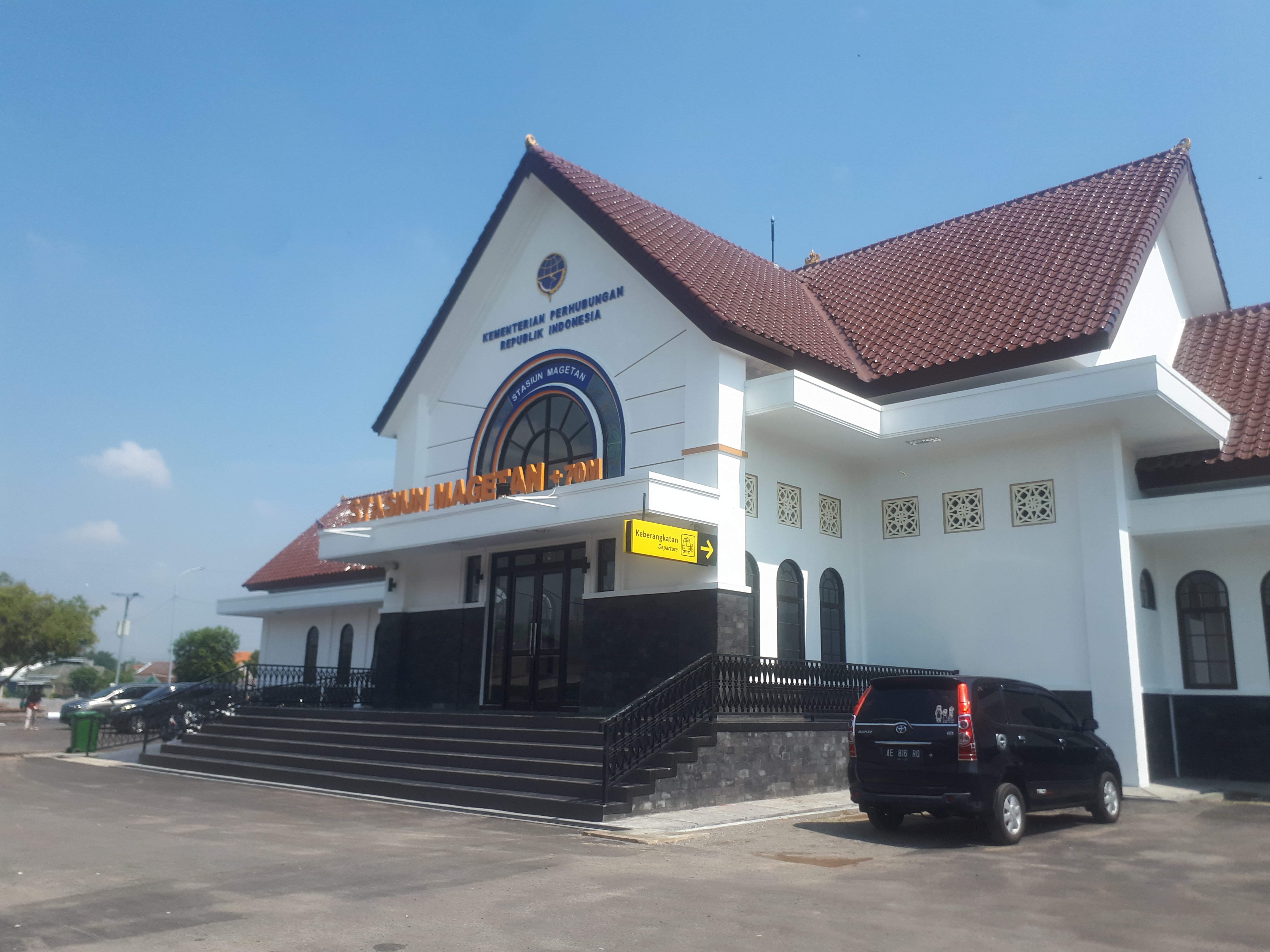 Bangunan baru Stasiun Magetan — sebelumnya bernama Stasiun Barat — mulai beroperasi pada 30 Oktober 2019 bersamaan dengan aktivasi rel jalur ganda Stasiun Babadan dan Stasiun Geneng.